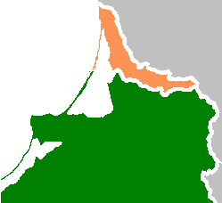 Het Memelland